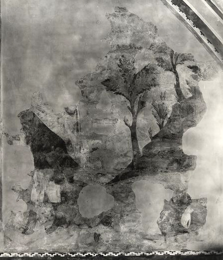 uccisione di abele